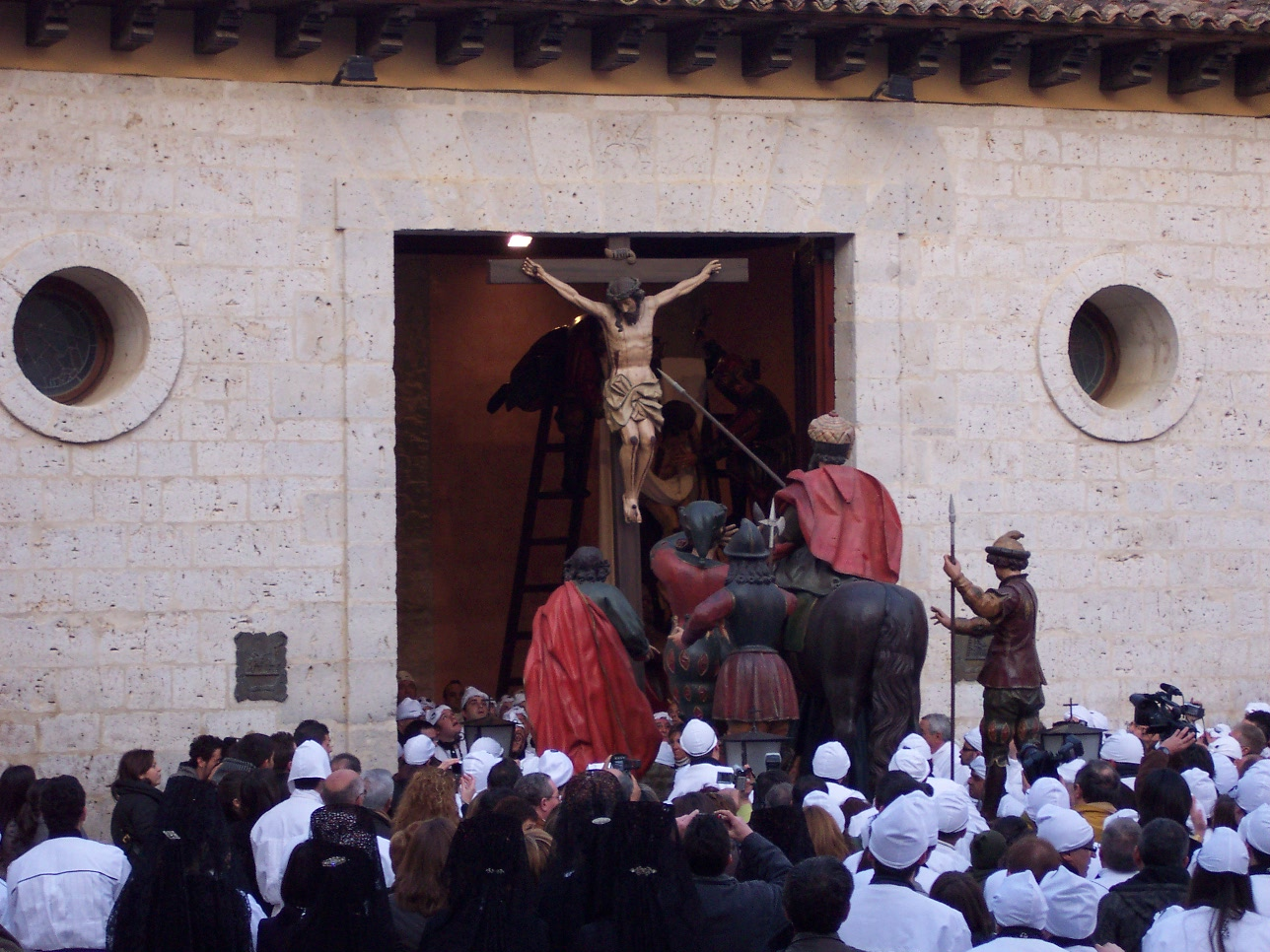 Paso de la Crucifixión del Señor, conocido popularmente como longinos, Hermandad del mismo nombre, Medina de Rioseco (Valladolid, España).